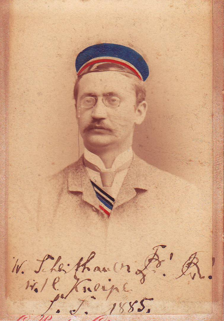 Waldemar Scheithauer als Heidelberger Rhenane